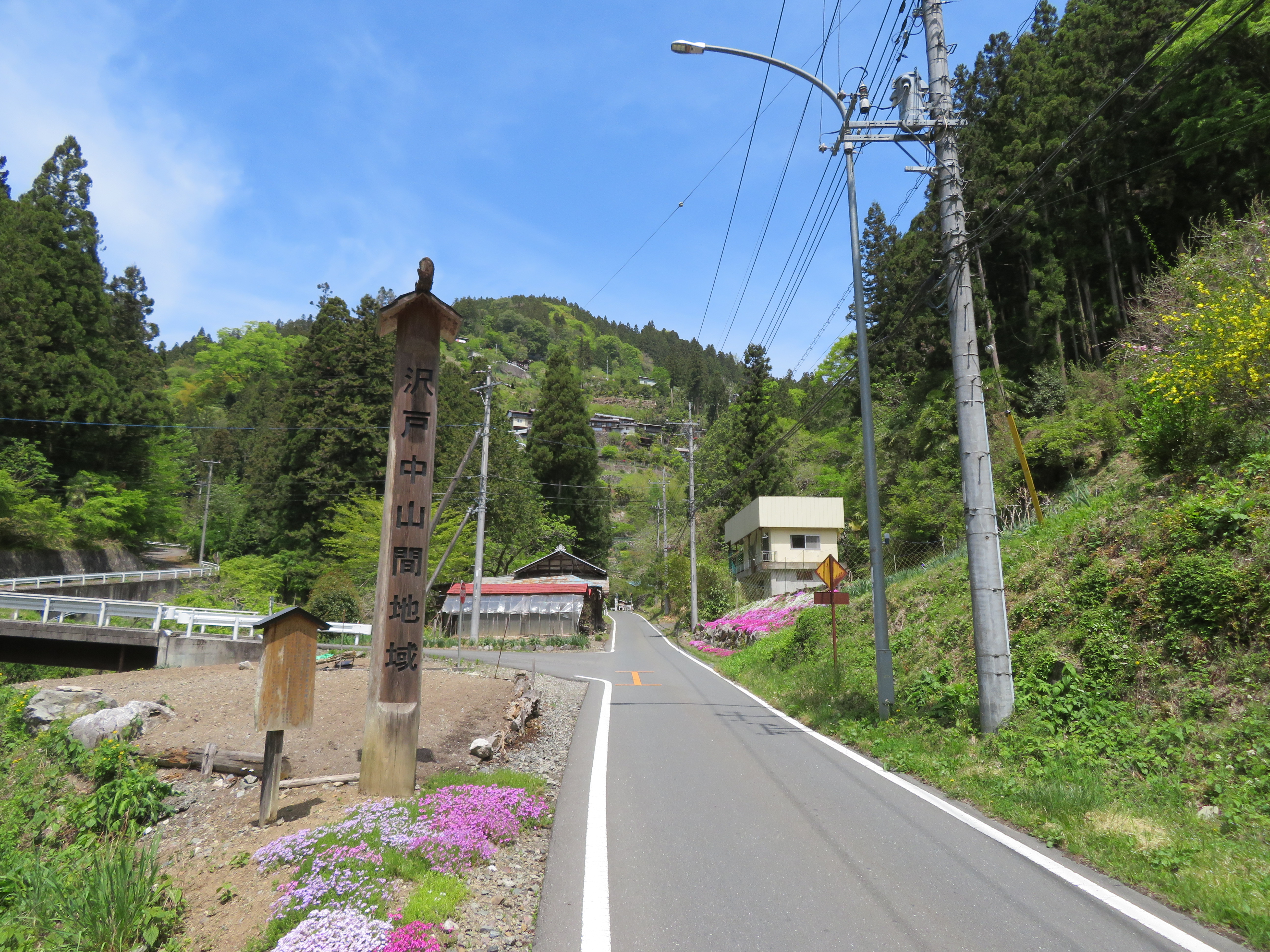 埼玉県道363号線秩父市吉田石間付近 Canon PowerShot SX720 HS